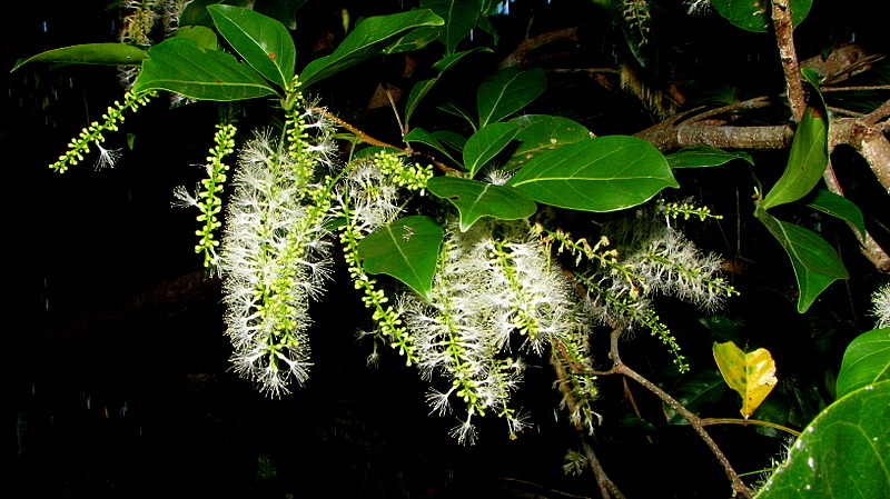 Inga laurina (Sw.) Willd.